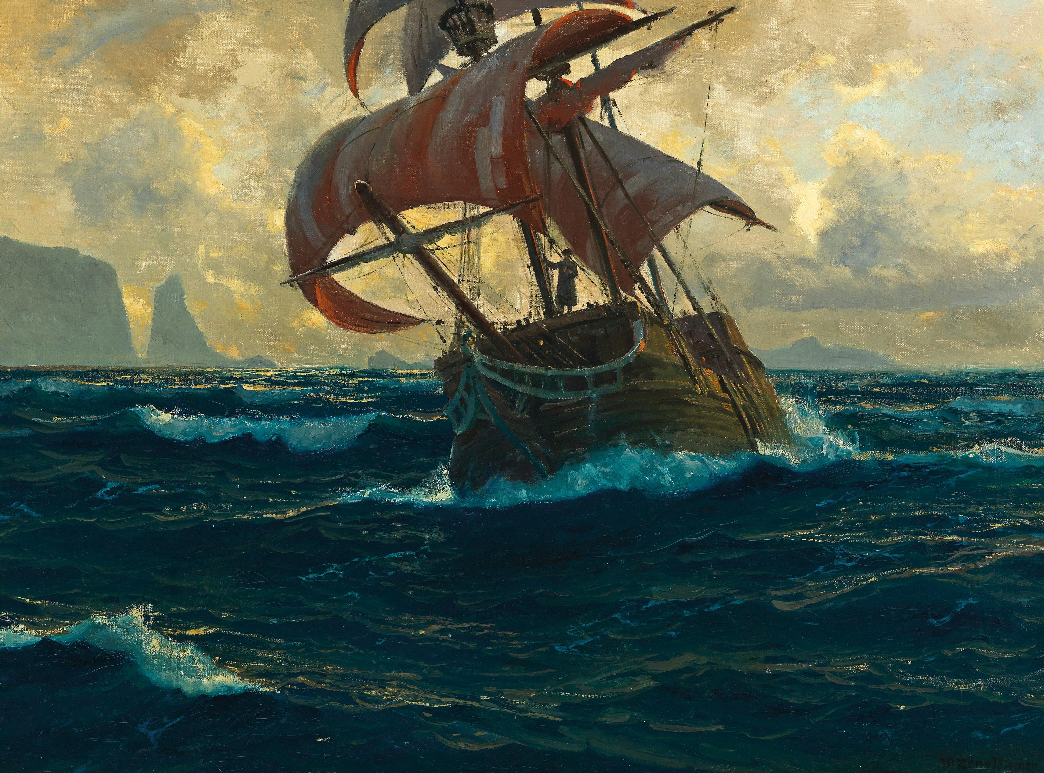 Der fliegende Holländer, signiert M. Zeno Diemer, Öl auf Leinwand, 70 x 95 cm